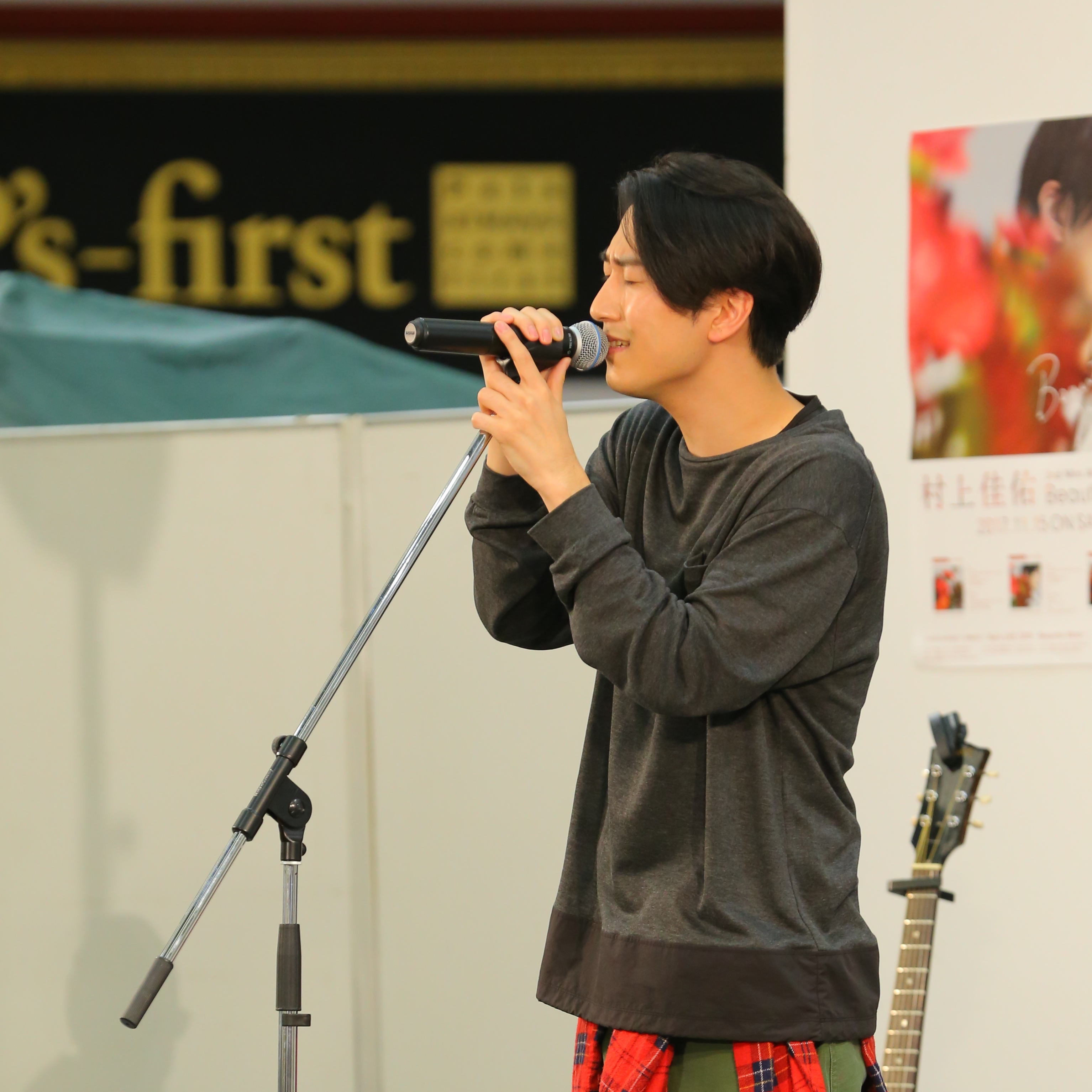 リリースイベントにて